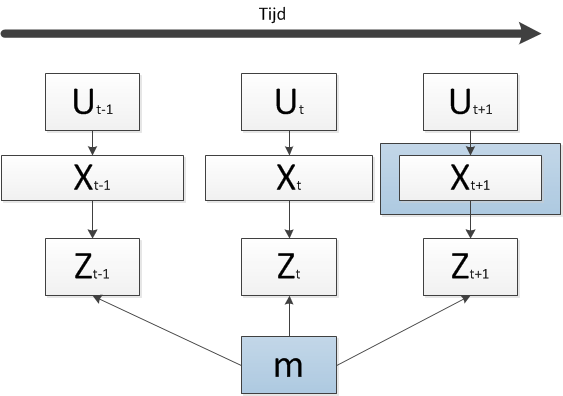 Schema van hoe een kaart wordt gegenereerd bij online SLAM door gebruik te maken van enkel 1 tijdstip